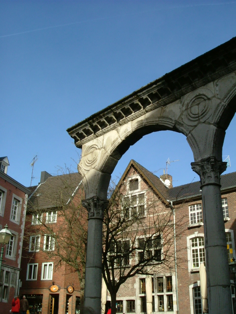 Kopie des römischen Portikus im "Hof", der im 1. und 2. Jahrhundert die Dom- mit der Bücheltherme verbunden hat